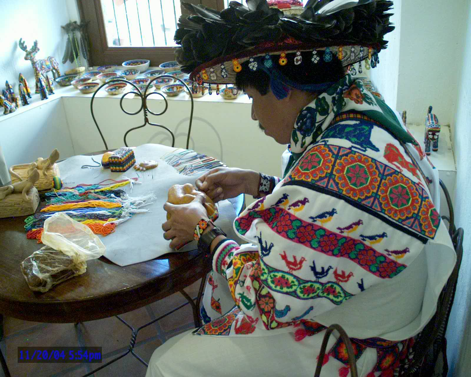 Huichol Trabajando, 20 Dic 2004 by Mario Jareda Beivide, Fotografias de Mexico